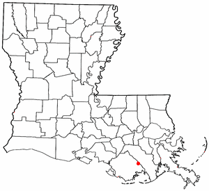 Volapük: Topam in tat: Louisiana.